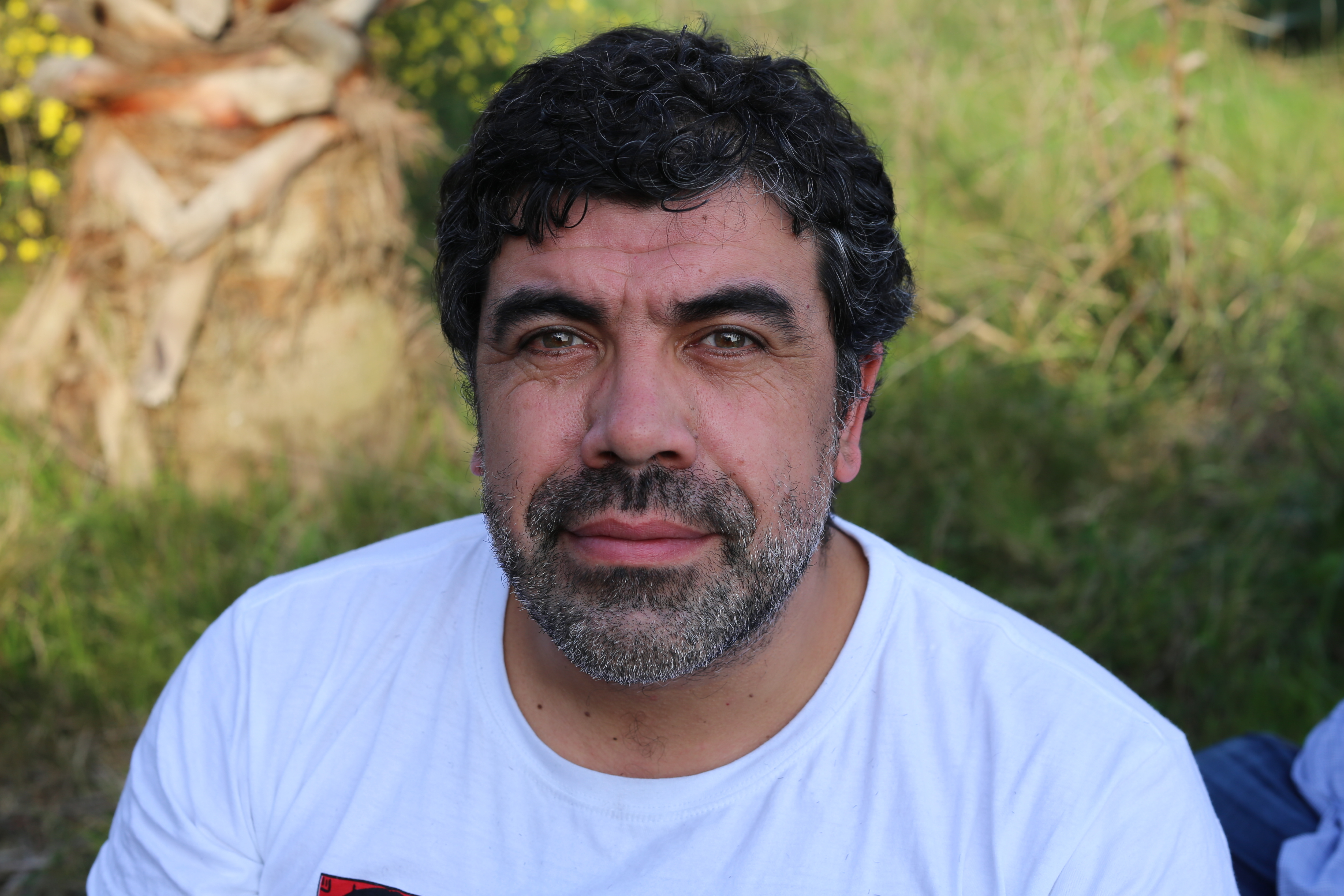 Sindicalista y político uruguayo Óscar Andrade.